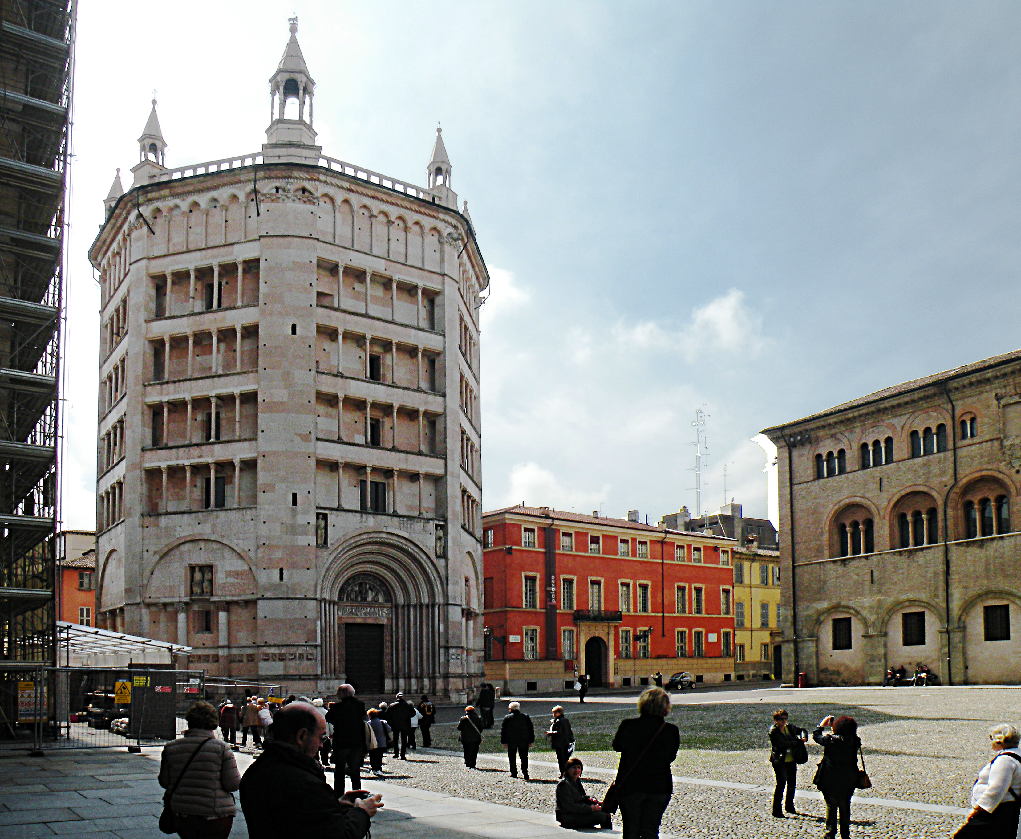 Баптистерий в Парме